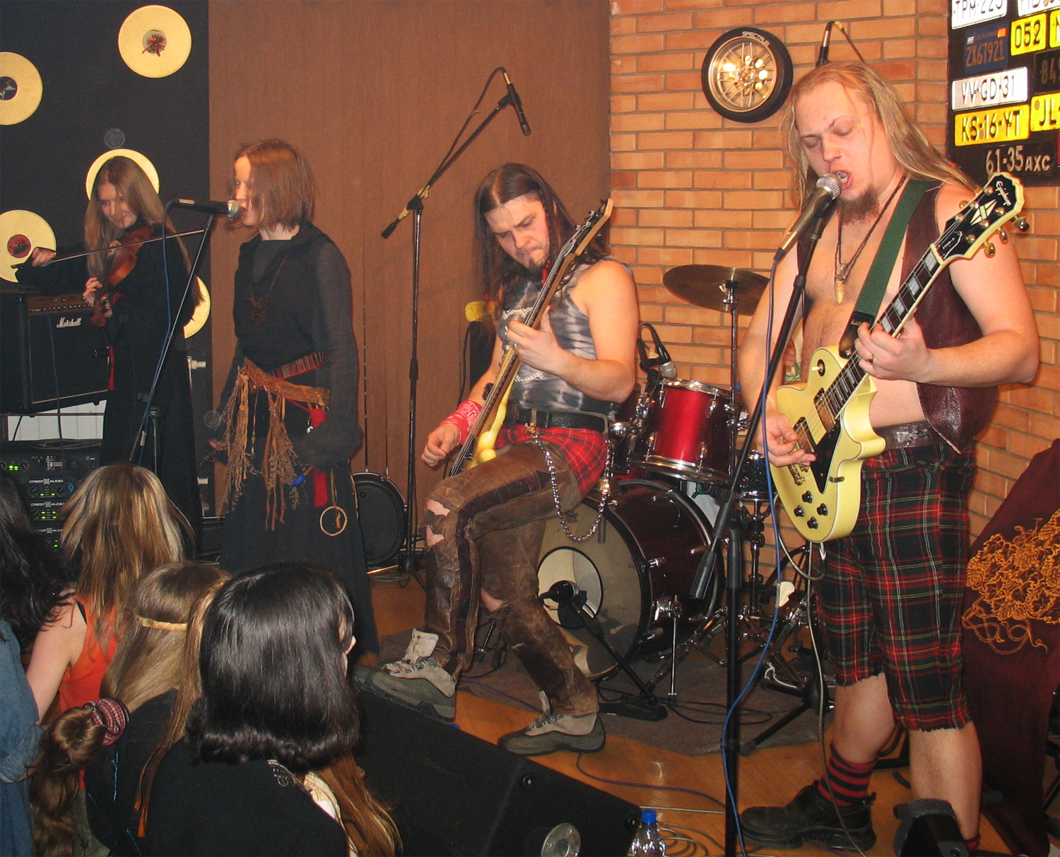 "Тролль Гнёт Ель" folk-rock group